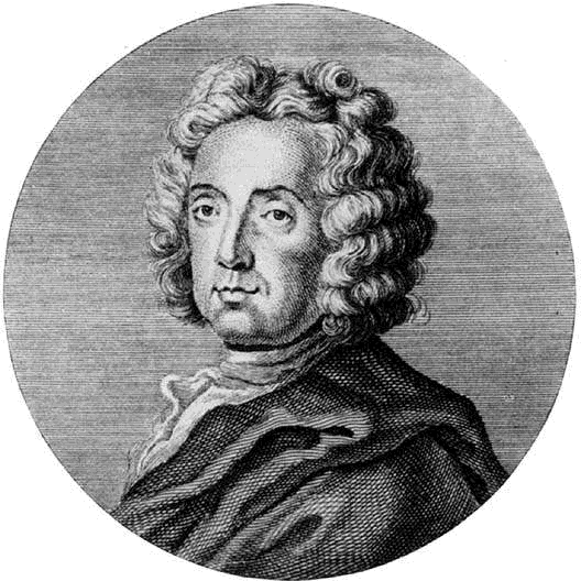 Italian composer Giovanni Battista Bononcini